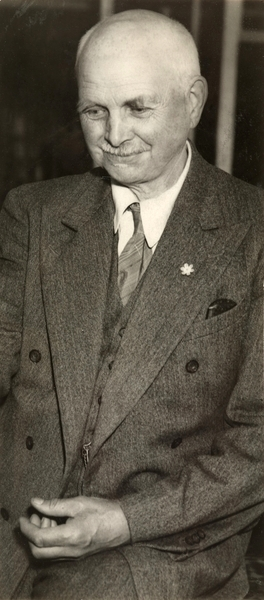 portrett, mann, kunstmaler, halvfigur.